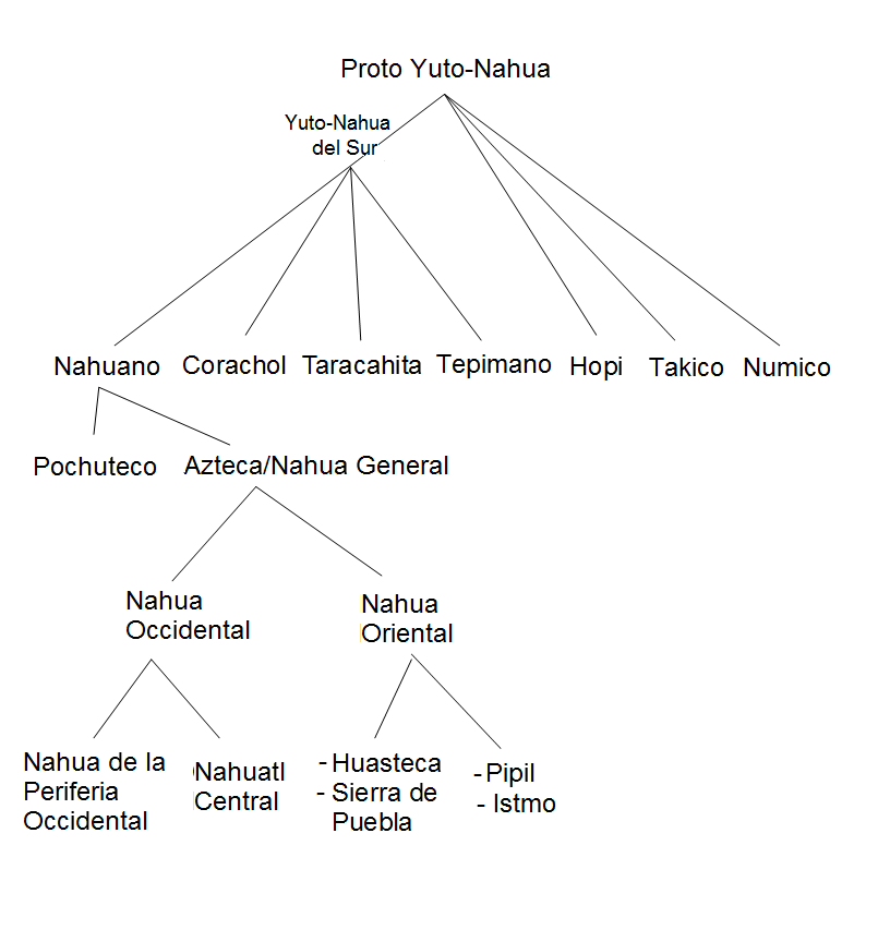 Esta imagen es la versión en español de otra imagen de Commons en inglés. Describe la ramificación del náhuatl según Kauffman (2001), con algunas variantes.